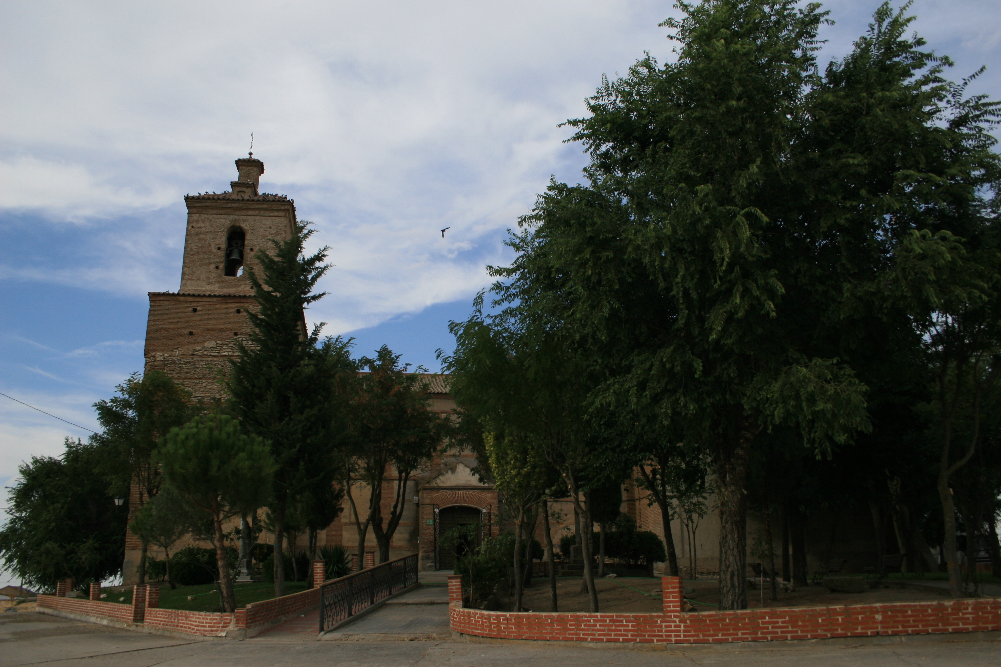 Villanueva del Aceral